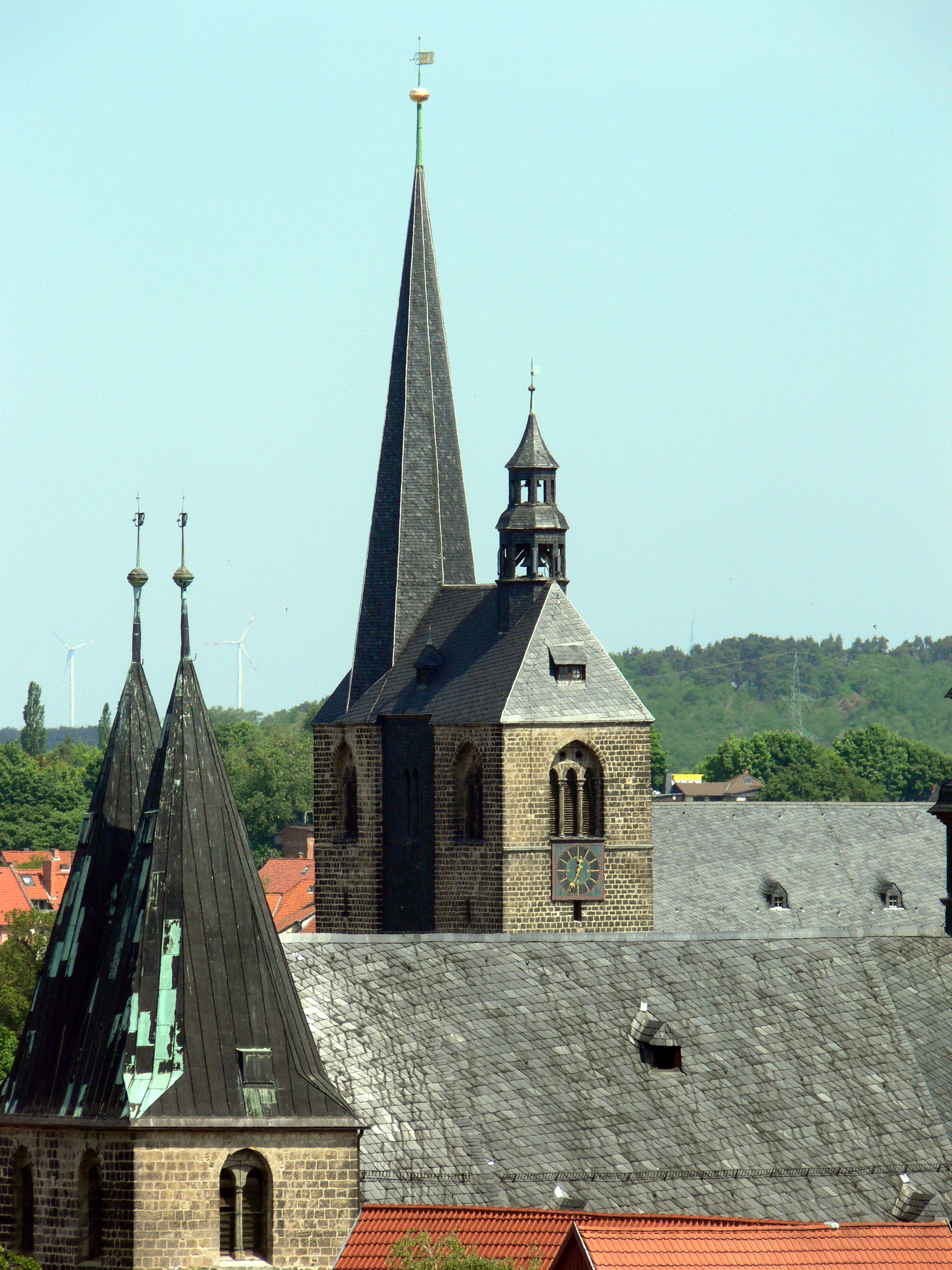 Blick vom Schloss auf die Benedikti—Kirche. Vorn die Blasii—Kirche.